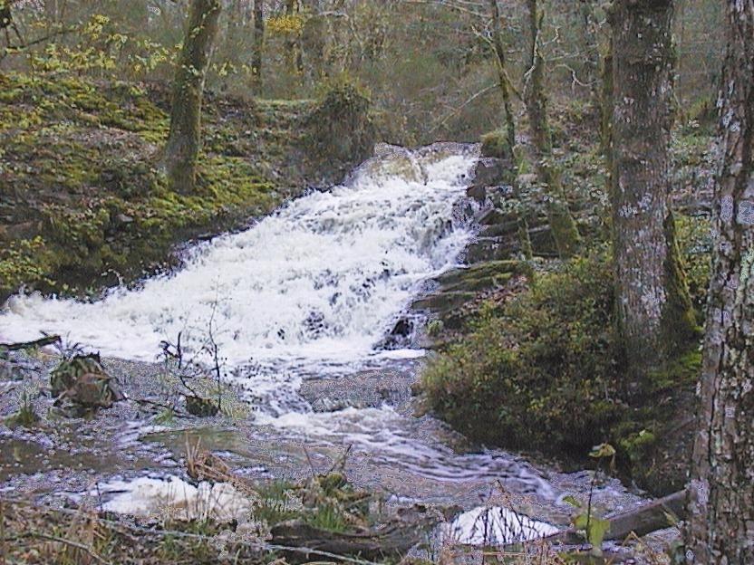 Déversoir de l'étang de Beauvais (étang d'En-haut) de Paimpont en France en avril 1998 (débit très élevé) (cascade réduite à quelques litres par minute dans la période sèche ; août-septembre). Digue à gauche et rochers de schiste, ruisseau de la Noë.